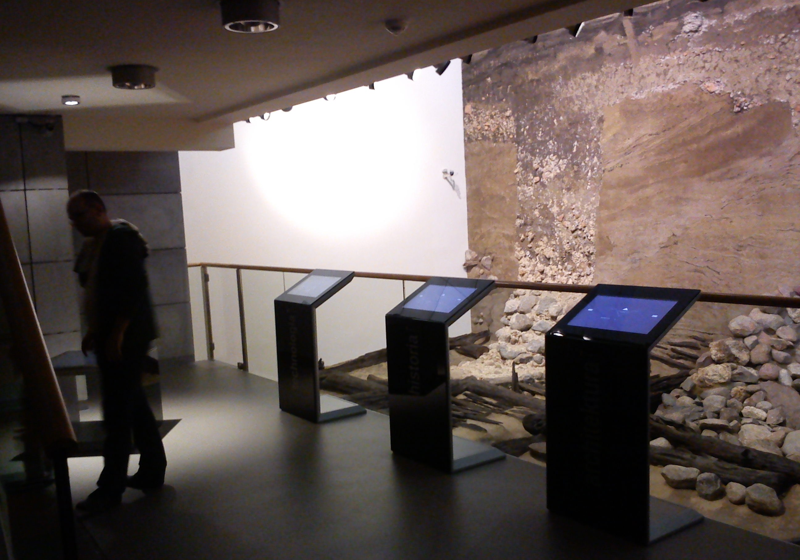 Rezerwat archeologiczny Genius Loci - Poznań, Ostrów Tumski.